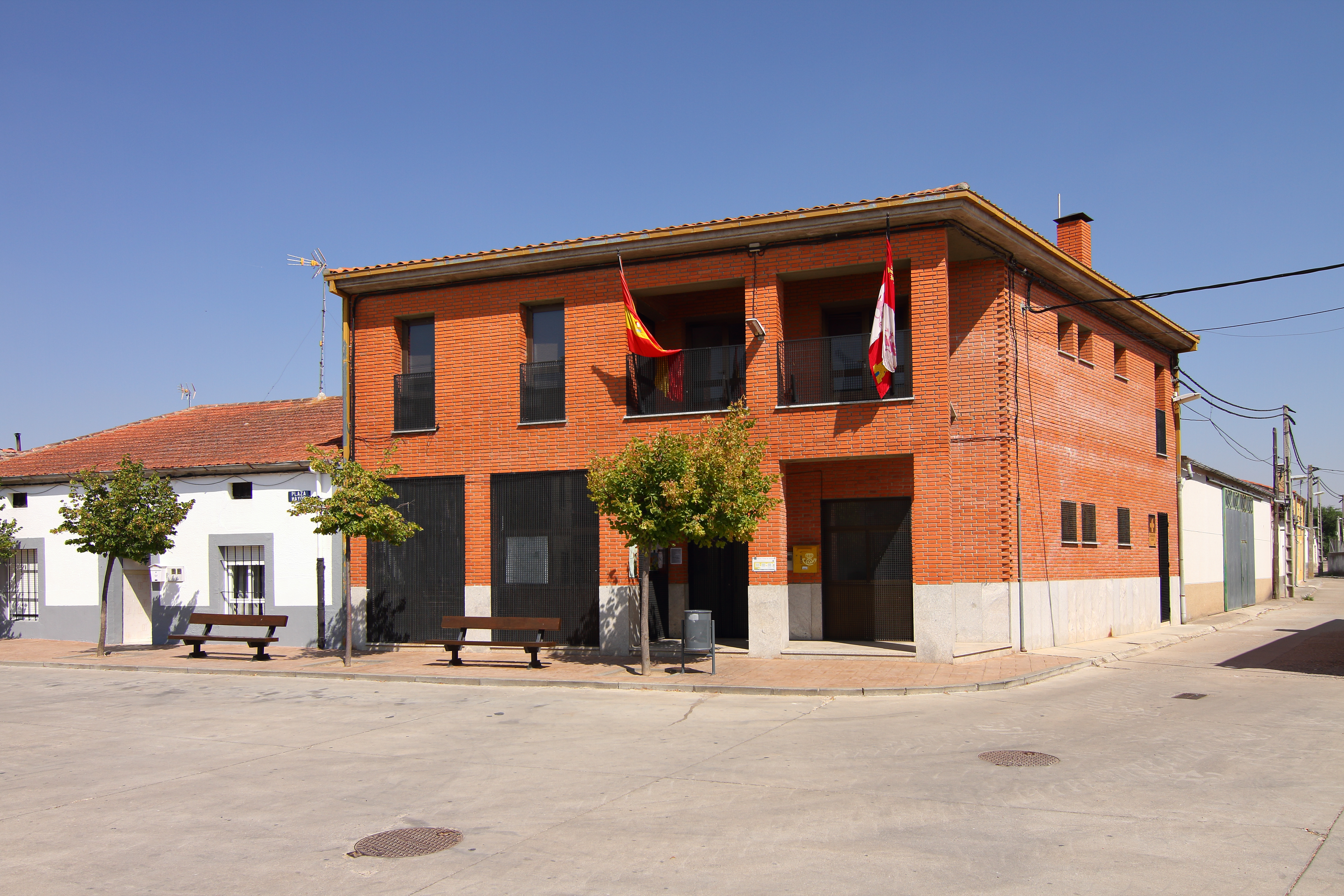 Ayuntamiento de Palencia de Negrilla